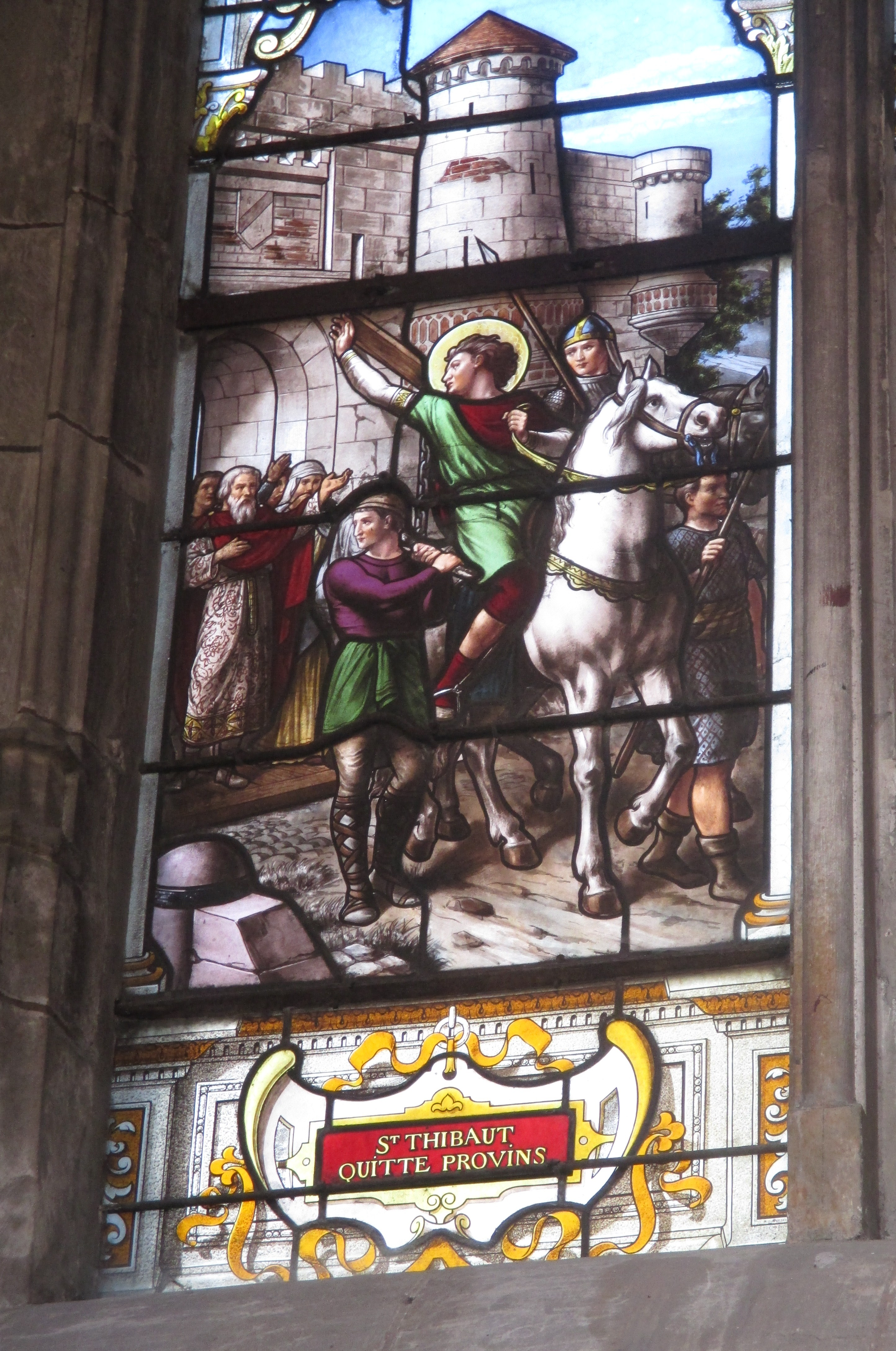 Église Saint-Thibault de Joigny (Yonne): détail du vitrail de saint Thibault.